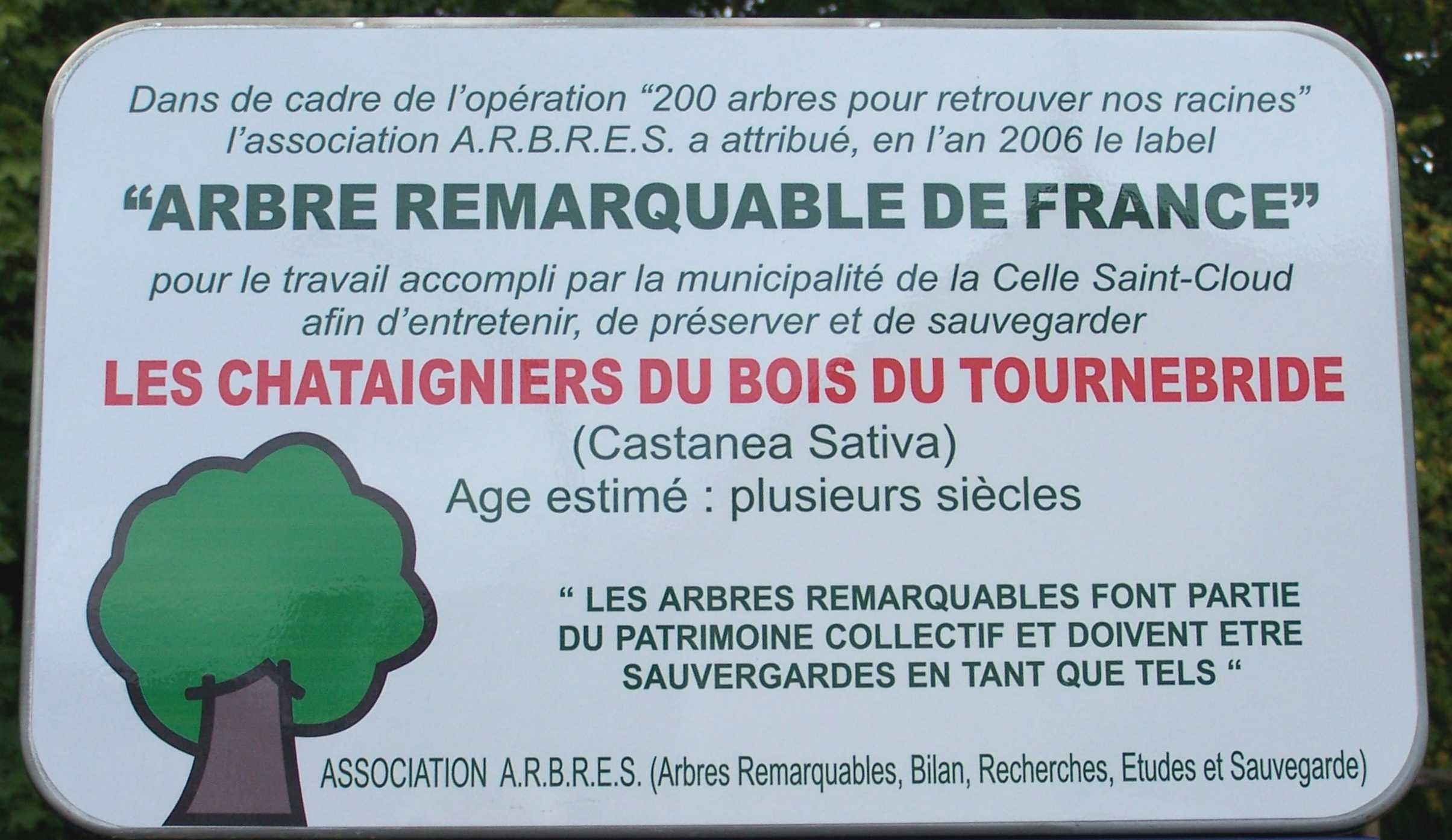 Panneau d'arbres remarquables pour les châtaigniers de Tournebride à la Celle-Saint-Cloud (Yvelines, France)